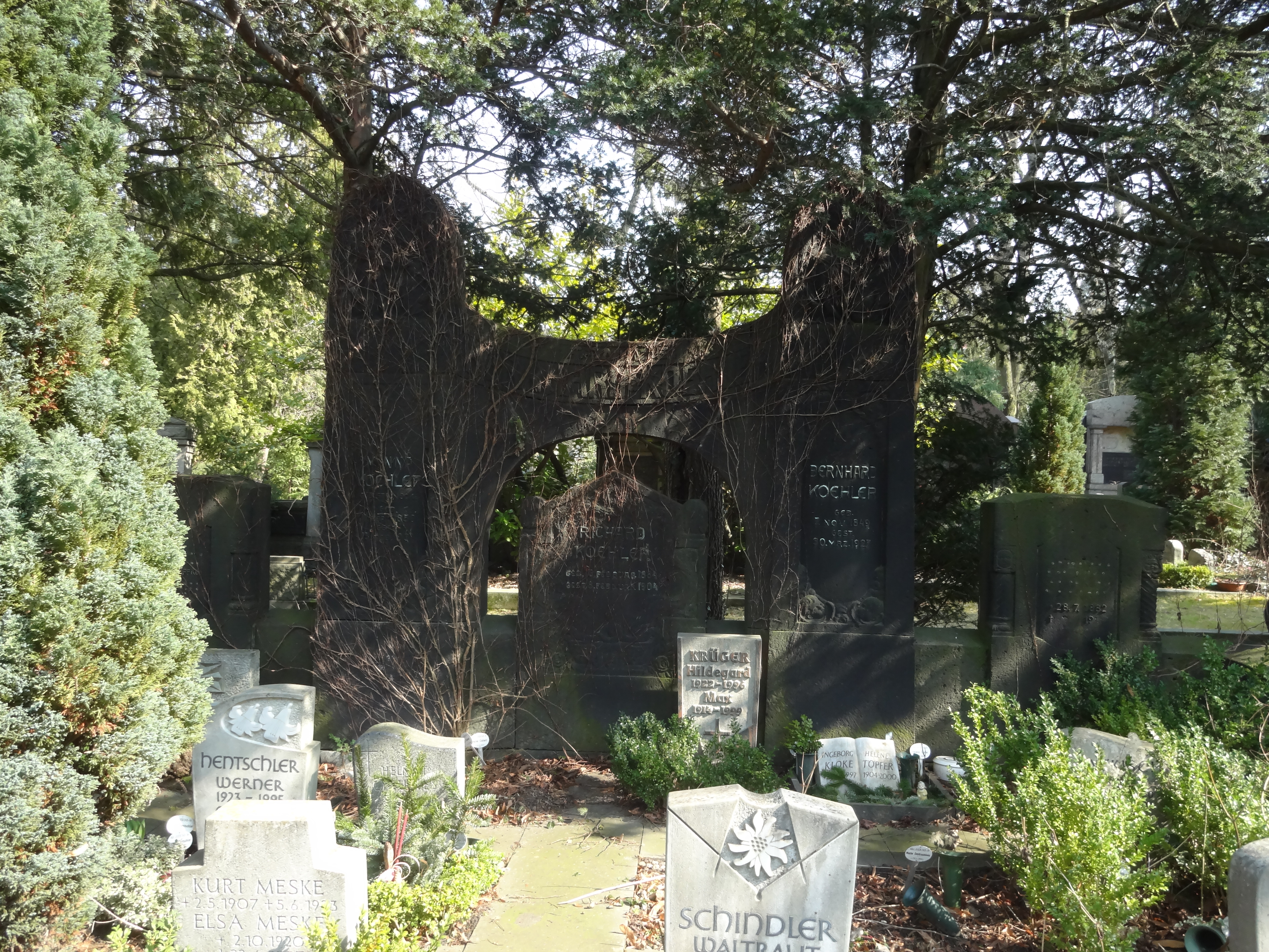 Grab von Bernhard Koehler auf dem Alten St.-Jacobi-Friedhof in Berlin